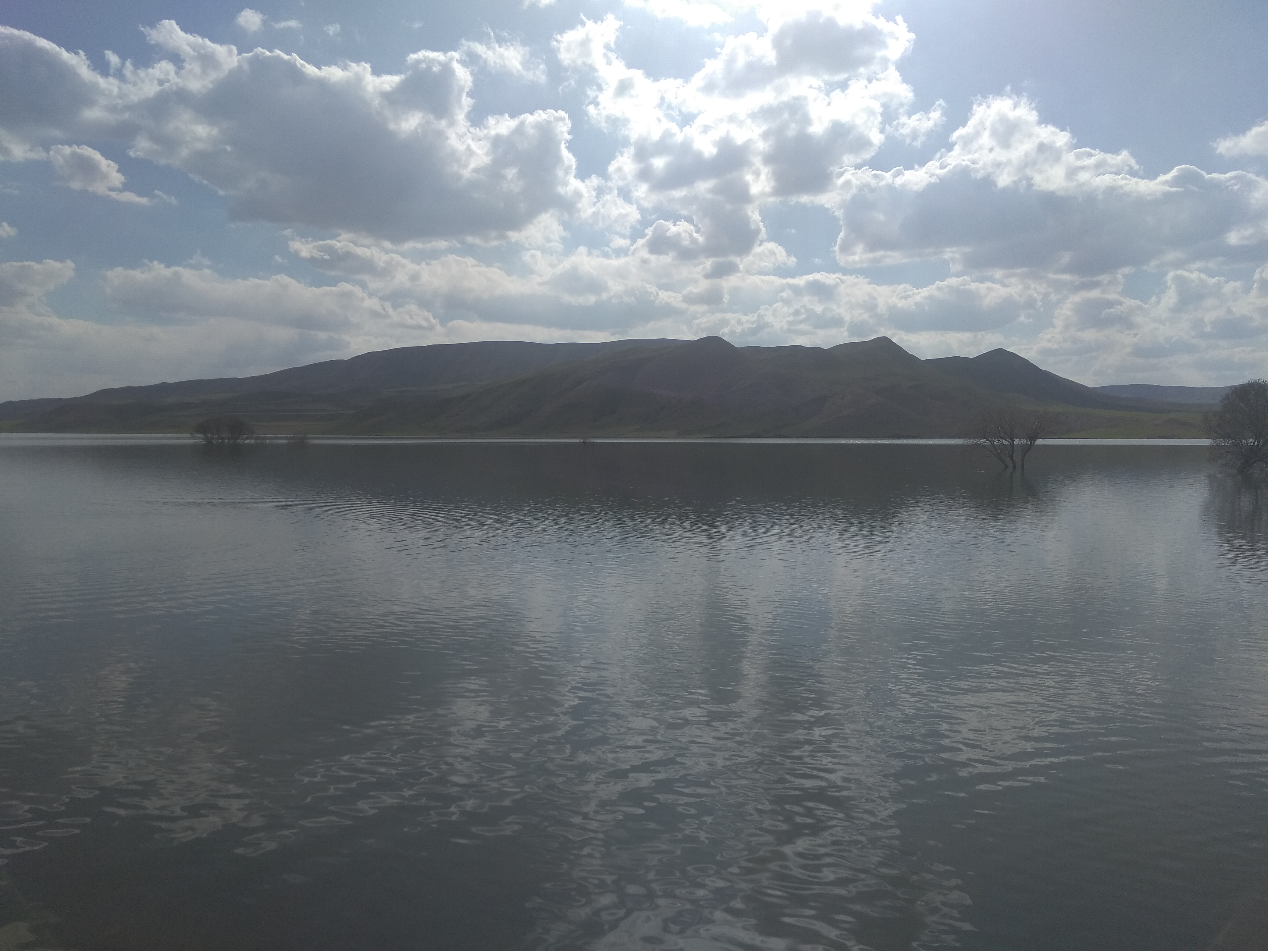 تصویر محو شدن روستای چهل امیران چنگ الماس در زیر آب سد تالوار در 5 اردیبهشت 1398